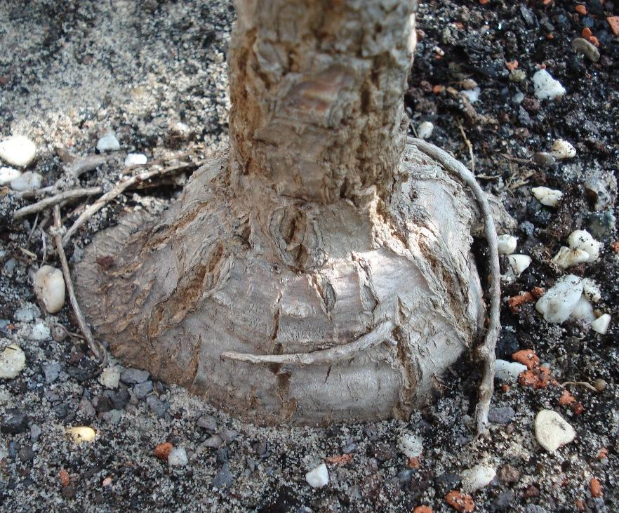 Lignotuber von Cussionia paniculata